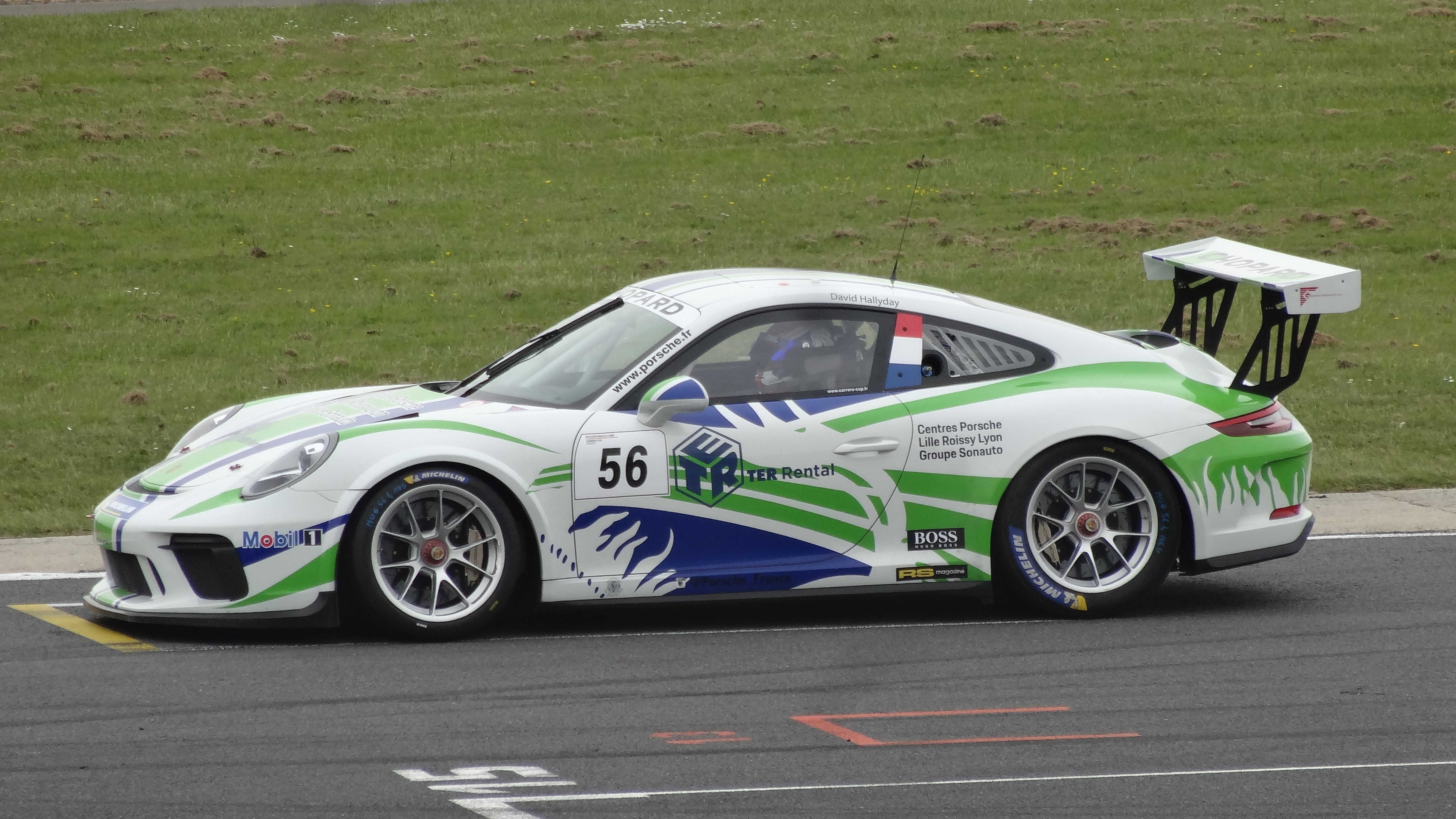 52e Coupes de Pâques (sport automobile), sur le Circuit Paul Armagnac à Nogaro (Gers) : Porsche Carrera Cup France - David Hallyday sur la grille de départ.